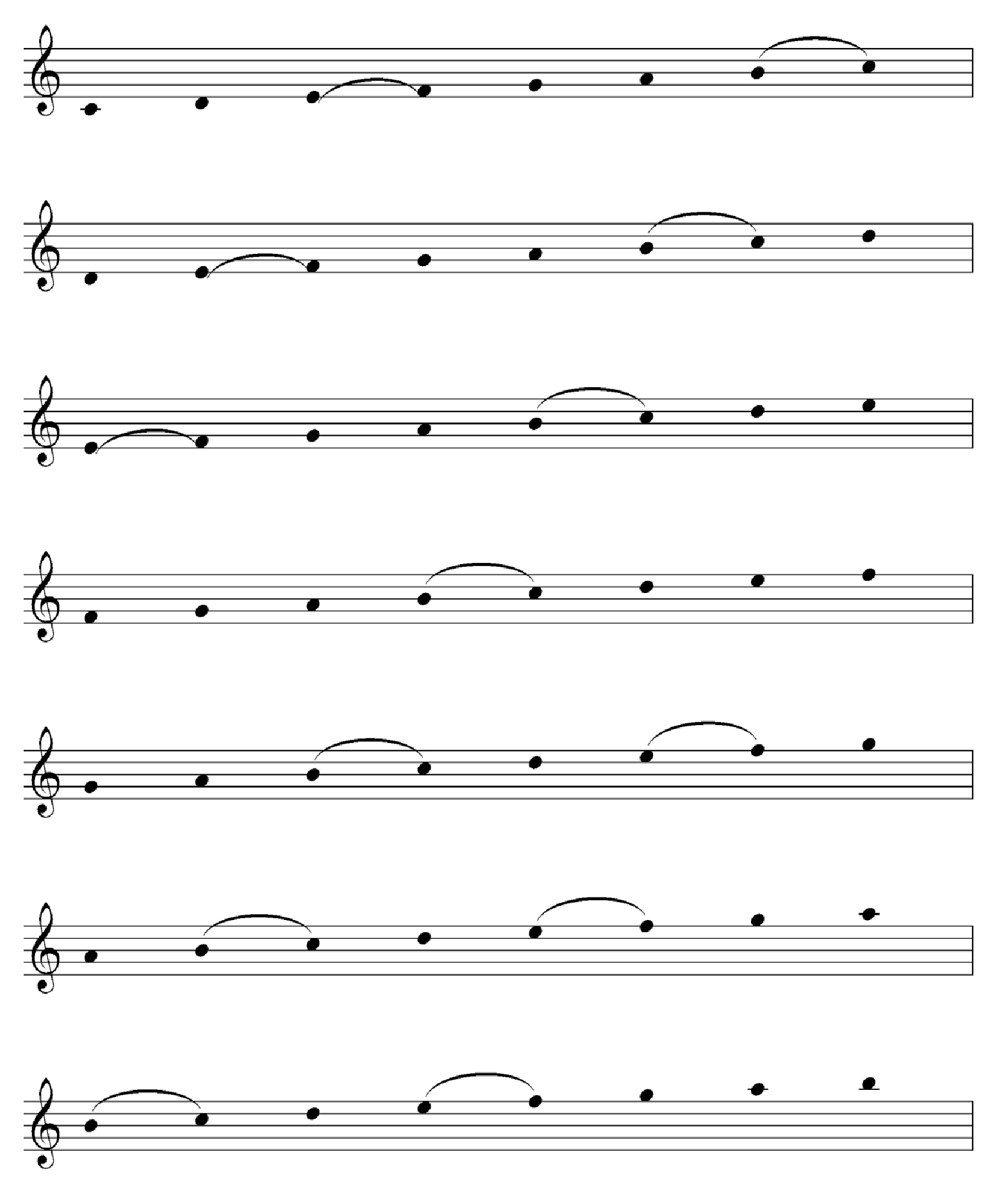 ModosRelativos